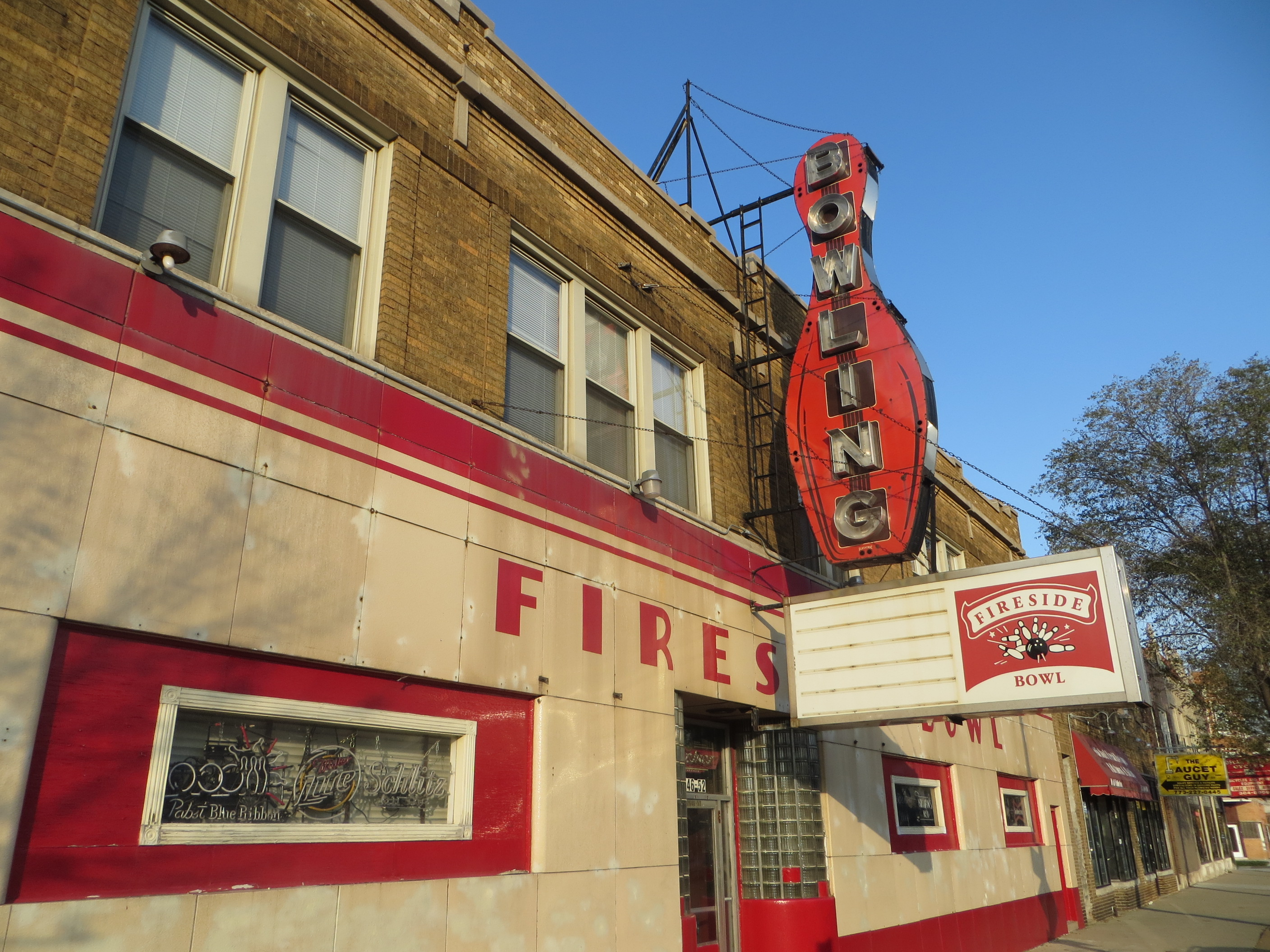 20151110 24 Fireside Bowl